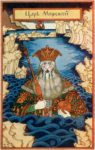 Царь морской. 1911. Открытка издания "Общины св. Евгении". №5525. Из коллекции Э.Б. Файнштейна